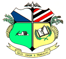 Brasão da cidade de Balsas - MA